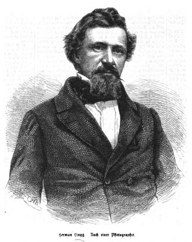 Hermann Lingg, deutscher Dichter im 19. Jh.